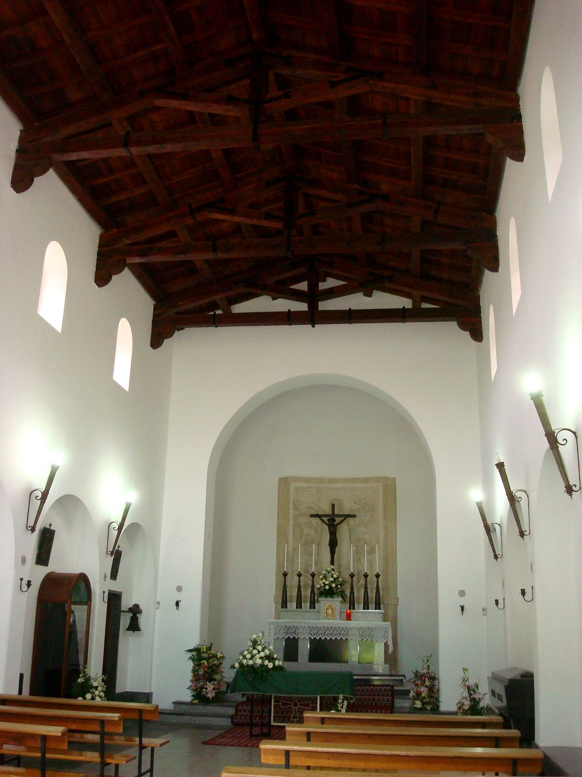 Interno della chiesetta della Madonna della Solitudine a Nuoro.